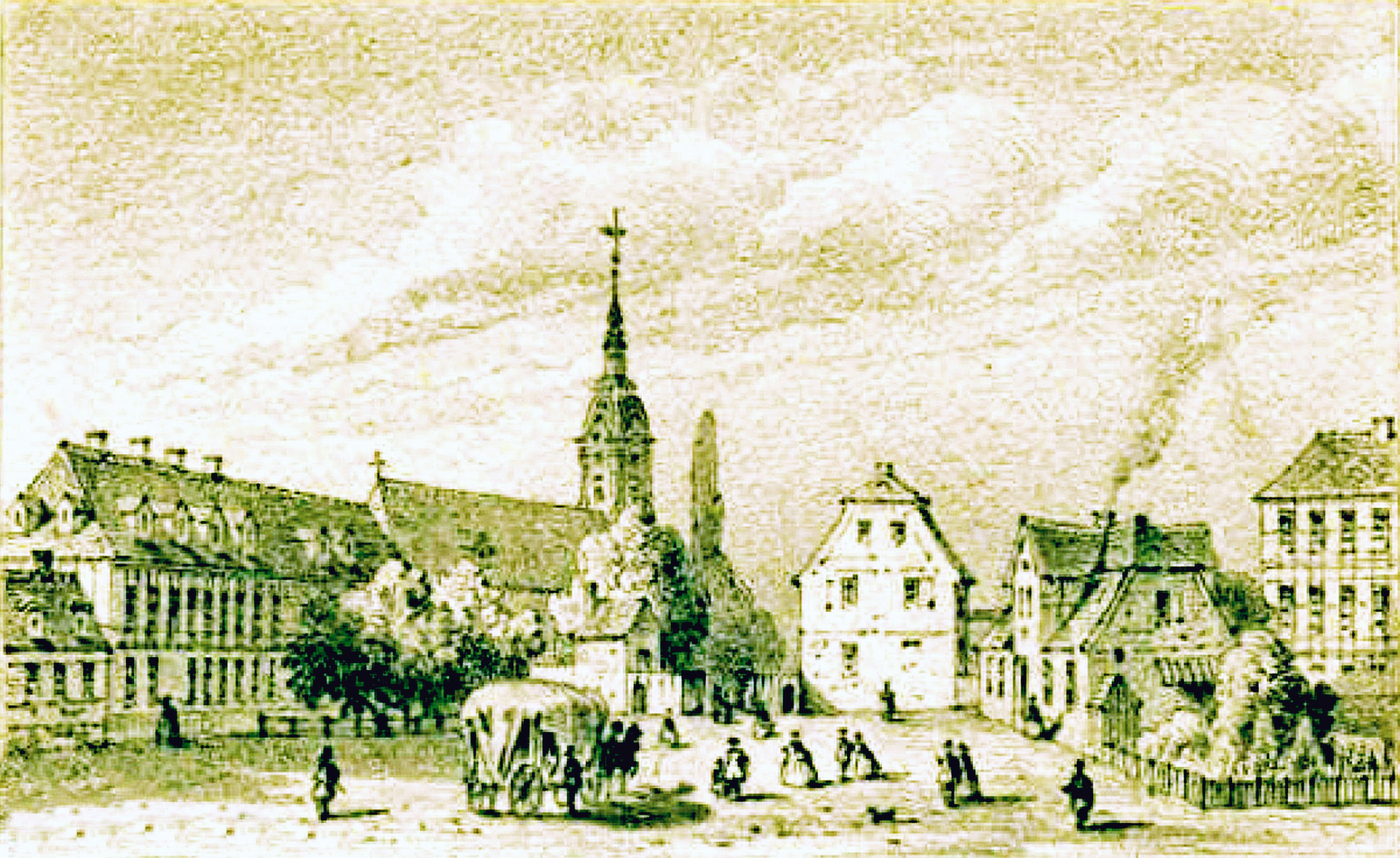 Leipzig, Äußeres Grimmaisches Tor, lavierte Bleistiftzeichnungv. l. n. r.: Georgenhaus, Johanniskirche, Äußeres Grimmaisches Tor (auch Kohlgärtnertor)